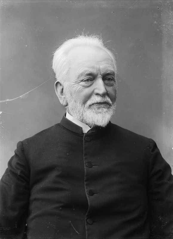 Portrett av Albert Henrik Krohn Balchen, prest og stortingsrepresentant, portrett, mann, sogneprest, brystbilde.